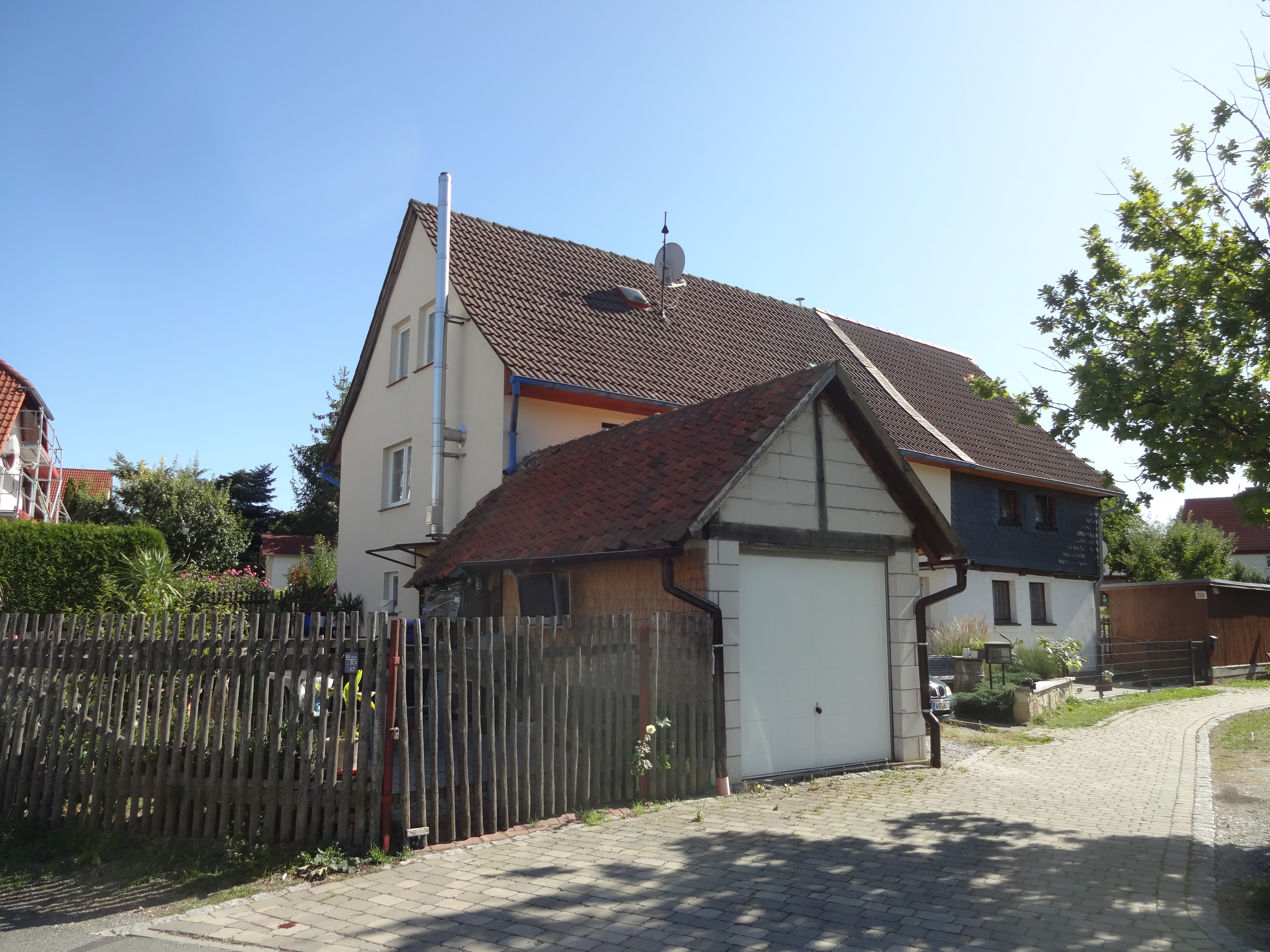 Wohnhaus Am Kamp 18/19 in Drübeck, das Haus war denkmalgeschützt